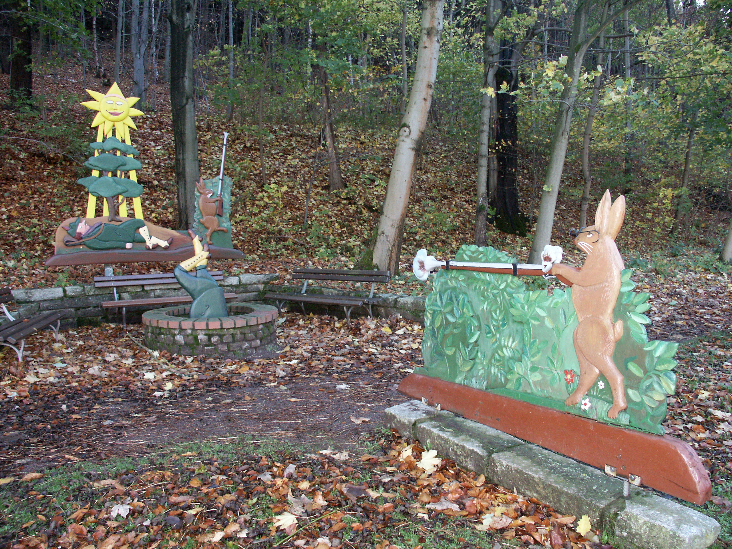 Struwwelpeter-Park Tabarz, geschnitzte Märchenfiguren "Die Geschichte vom wilden Jäger"